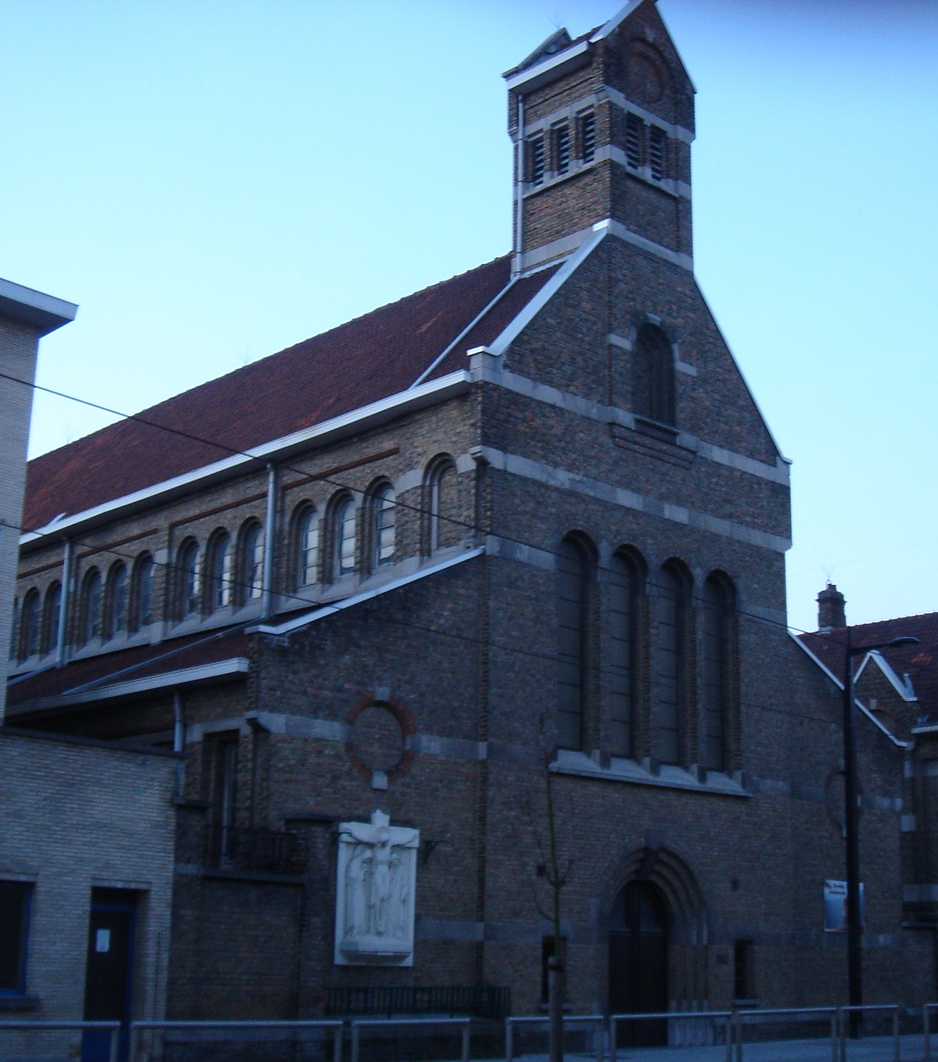 Redemptoristenkerk in Voskenslaan, Gent.